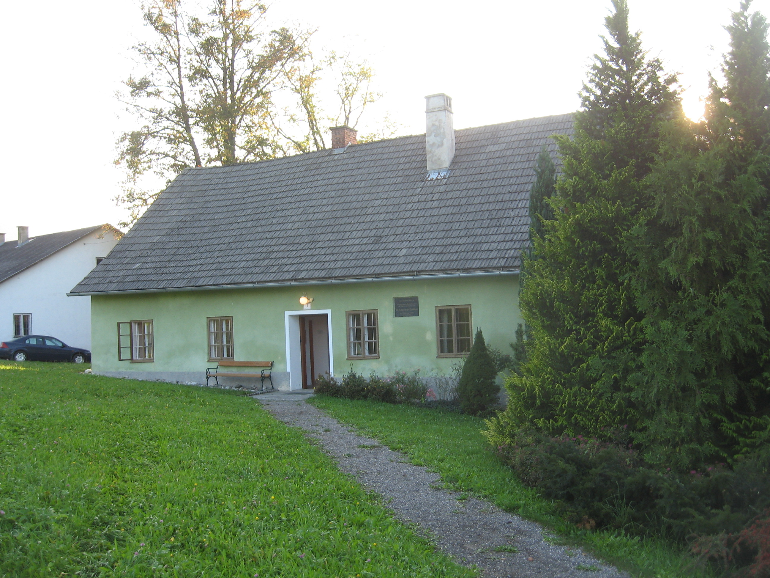 Geburtshaus mit Dr.-Dollfuß-Museum in Texing außen